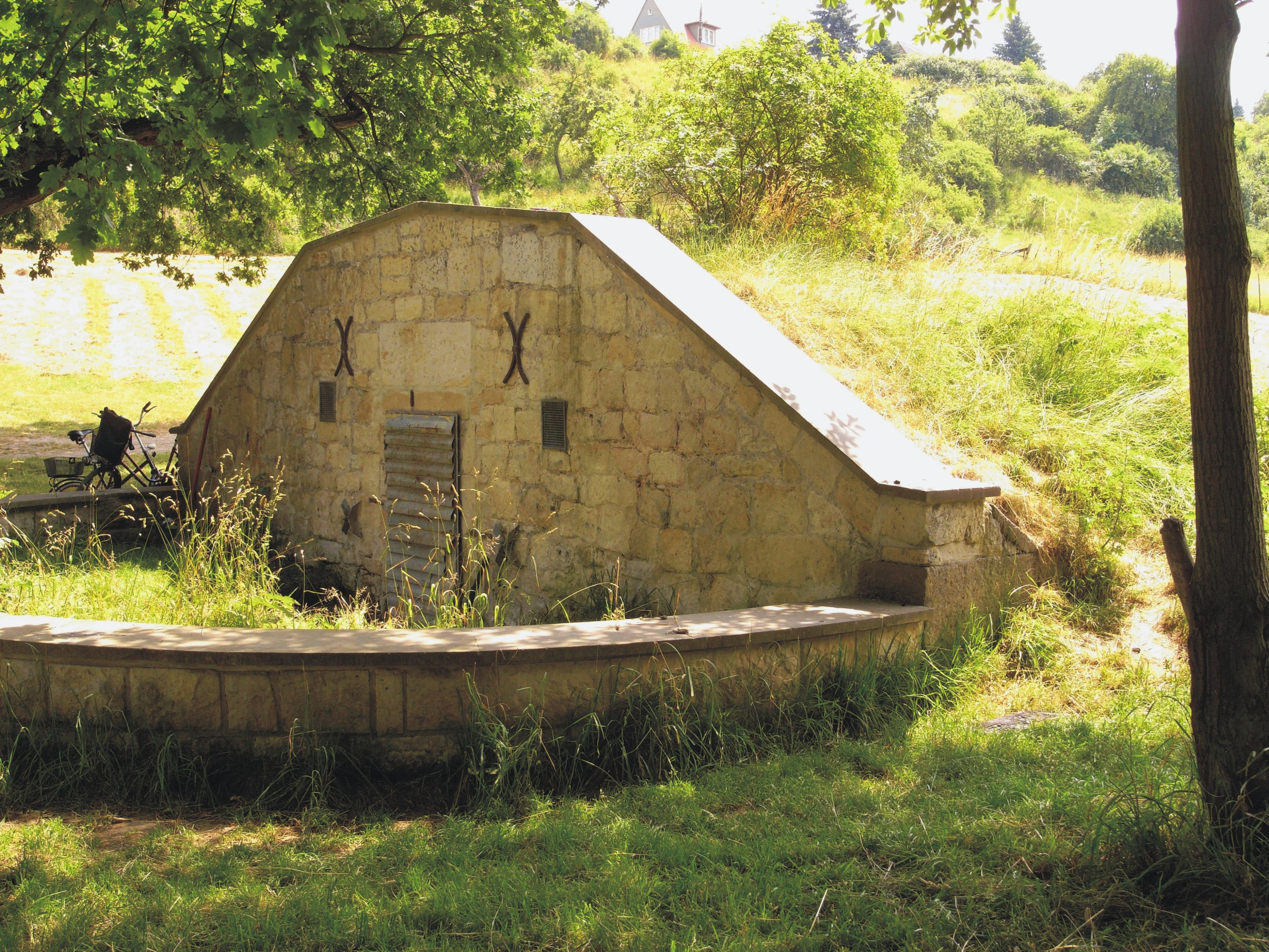 Tal des Leubnitzbaches, Quelle des Heiligen Borns (Dresden / Leubnitz-Neuostra, Sachsen, Deutschland)